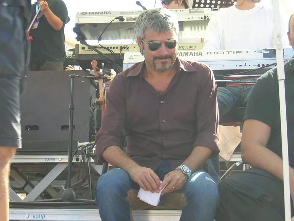 Pino Insegno Foto personale concessa in pubblico dominio